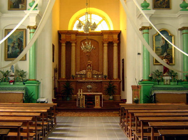 Вішнева. Інтэр'ер касцёла